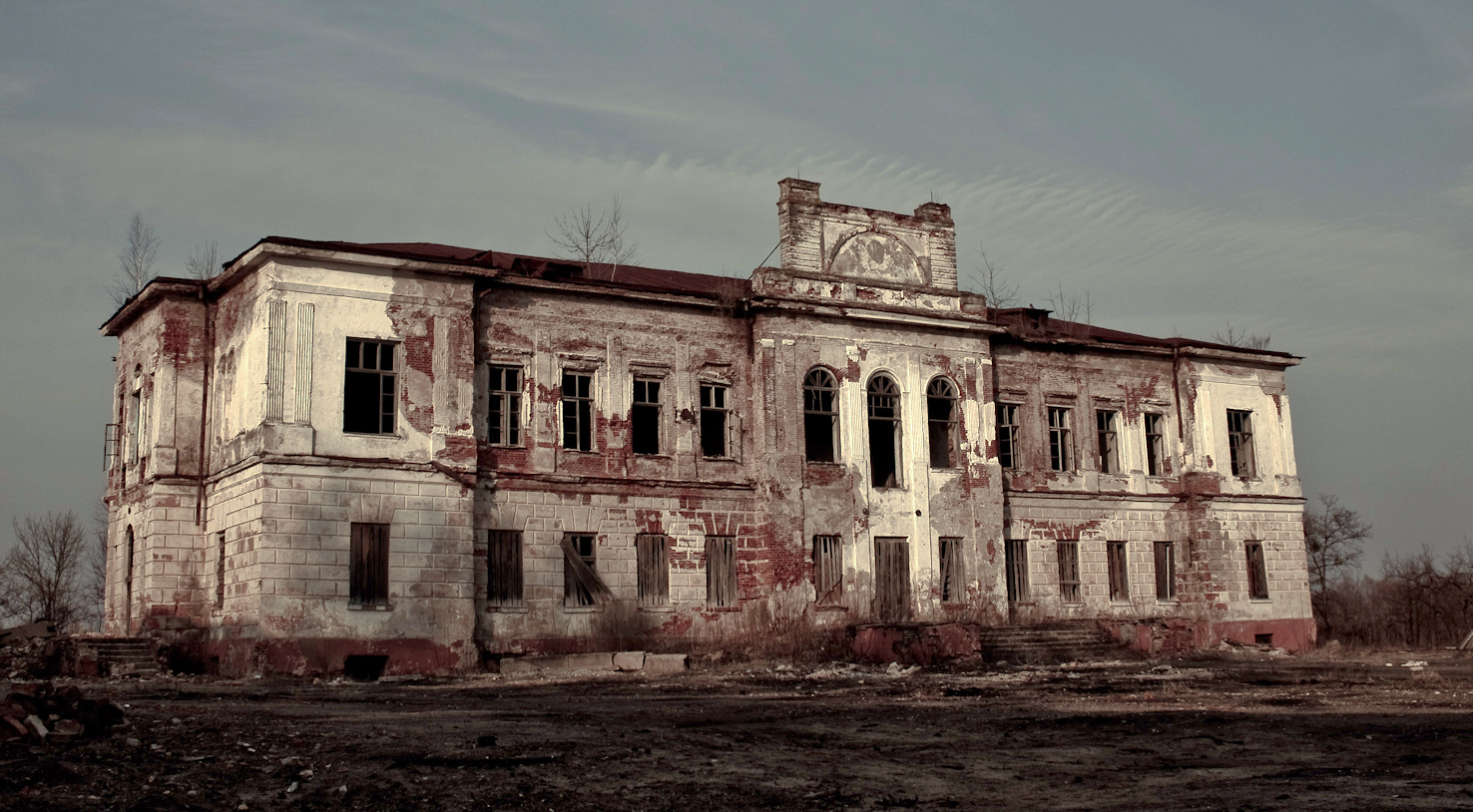 Беларуская (тарашкевіца): Палацава-паркавы ансамбль: палац, фантан, гаспадарчыя і вытворчыя пабудовы, альтанка, парк. г. Нароўля This is a photo of Belarusian heritage monument. Reference number: 312Г000536 ( WLM)